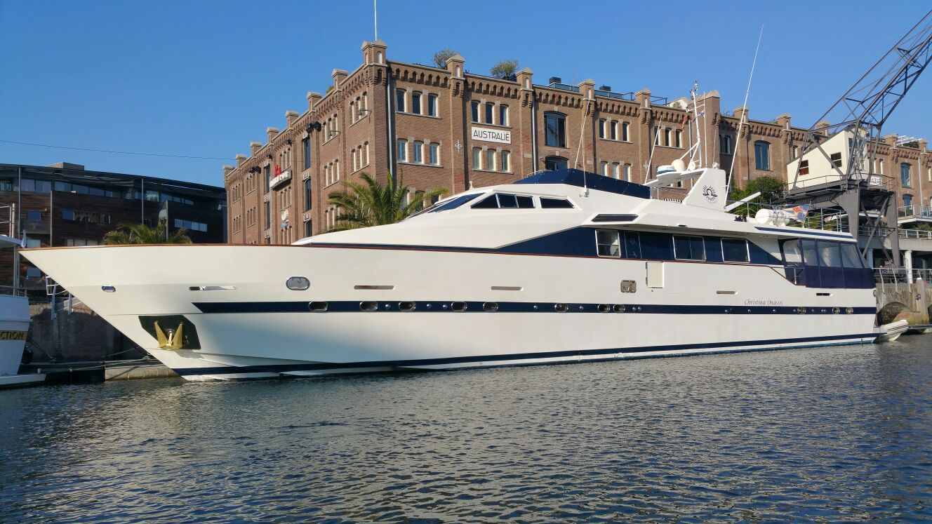 Christina Onassis superyacht